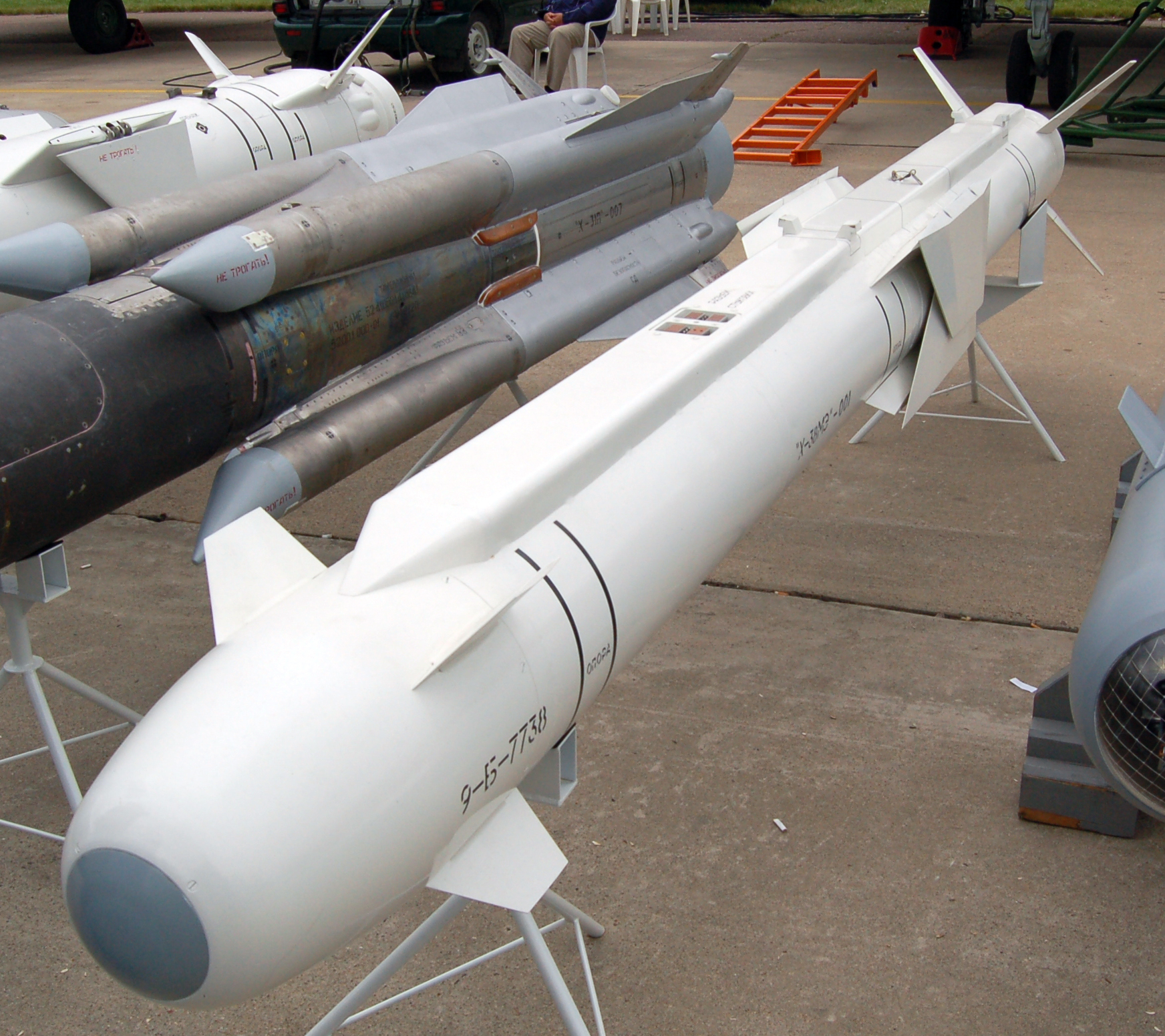 Ракета "воздух-поверхность" Х-38. МАКС-2009